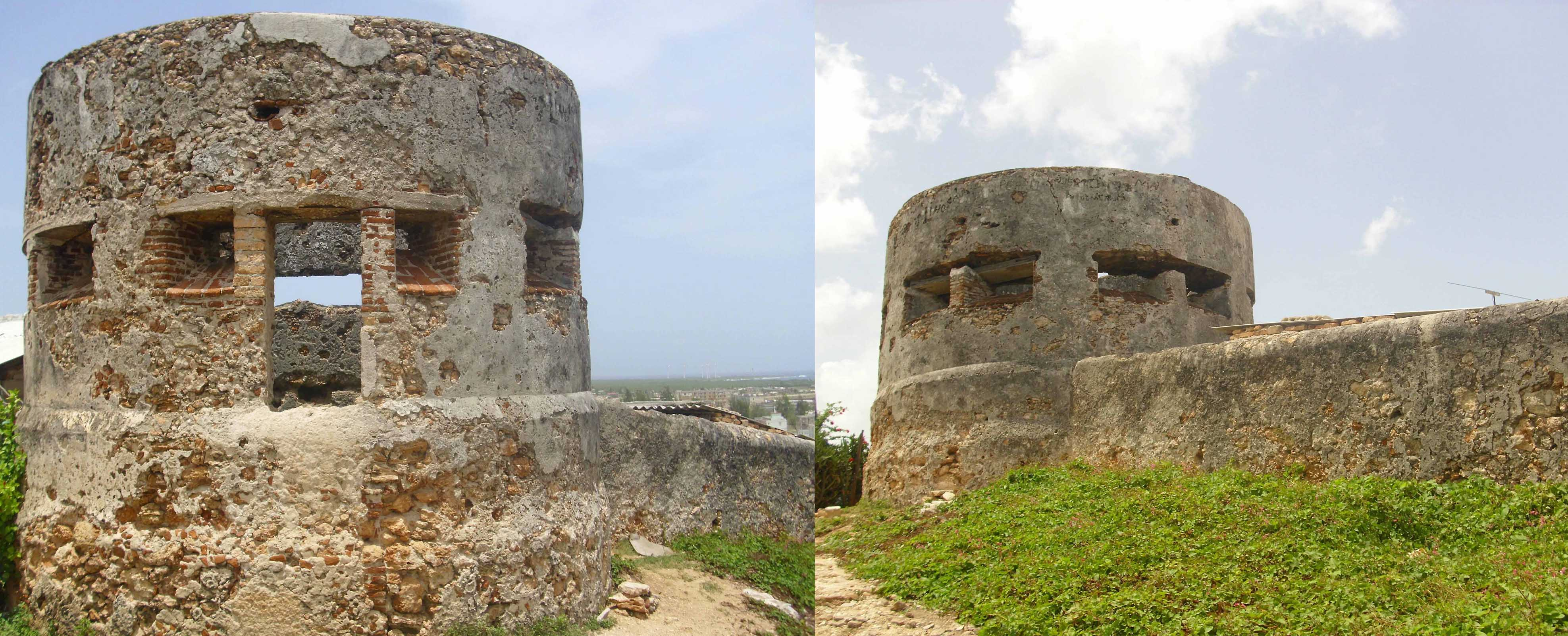 Parte de las Fortificaciones construidas en La Villa de Gibara durante el siglo XIX.